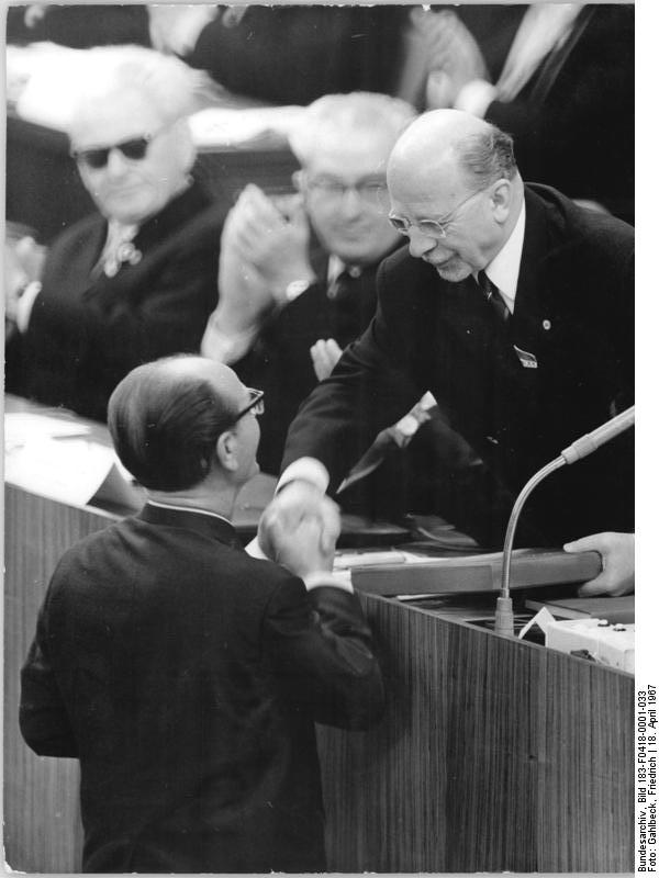 Zentralbild Gahlbeck 18.4.1967 bgm-zi VII. Parteitag der SED - 18.4.1967. Unter dem Beifall der Delegierten überreichte der 1. Sekretär der Bezirksleitung Suhl, Otto Funke, (vorn) dem Ersten Sekretär des ZK der SED, Walter Ulbricht, eine Dokumentation über die ersten Ergebnisse neuer Formen der Erzeugnisgruppenarbeit.